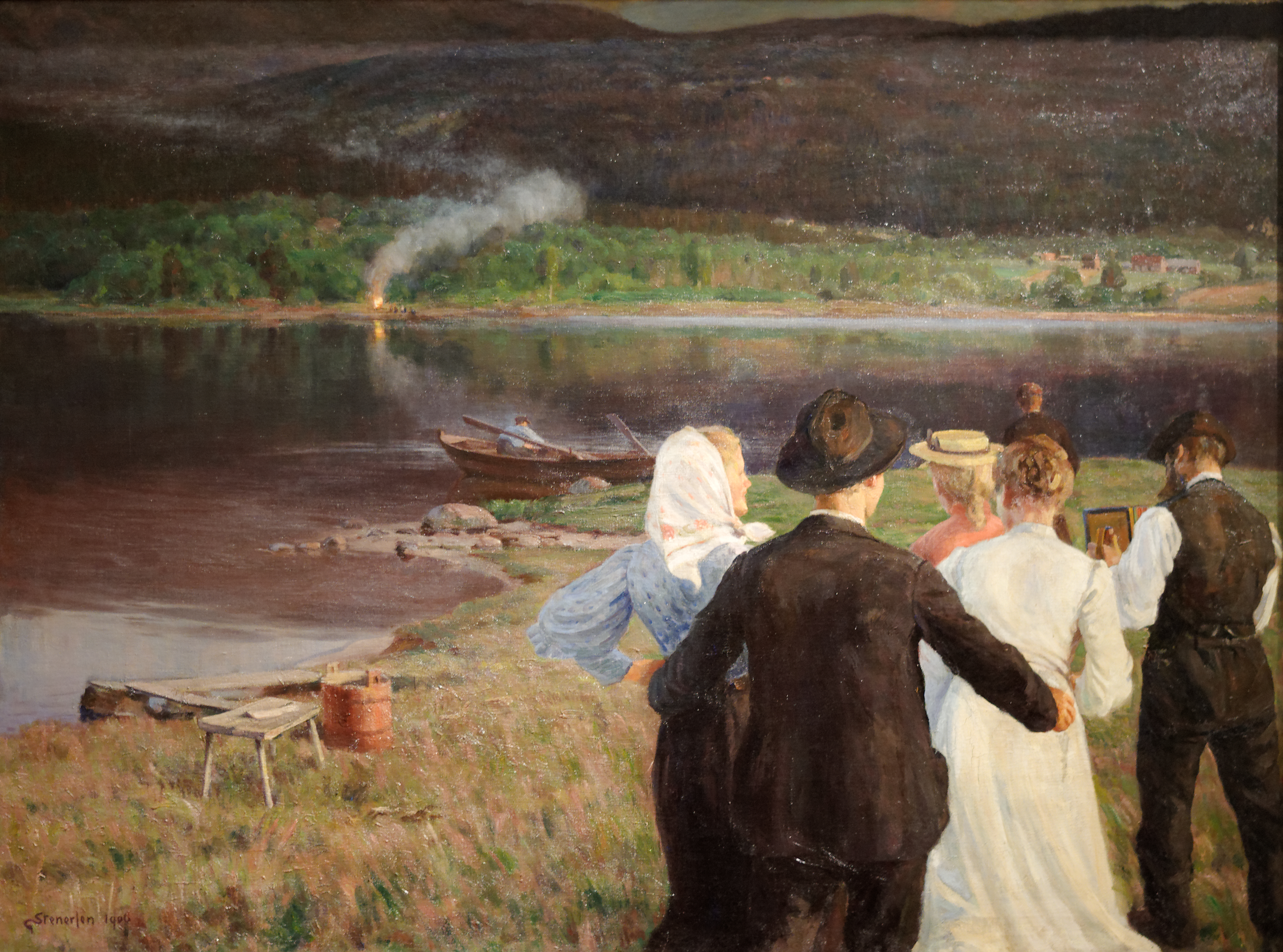 fête de la Saint Jean, Gudmund Stenersen 1906. Musée des beaux arts de Budapest Inv.Nr199 B. Acquis en 1907